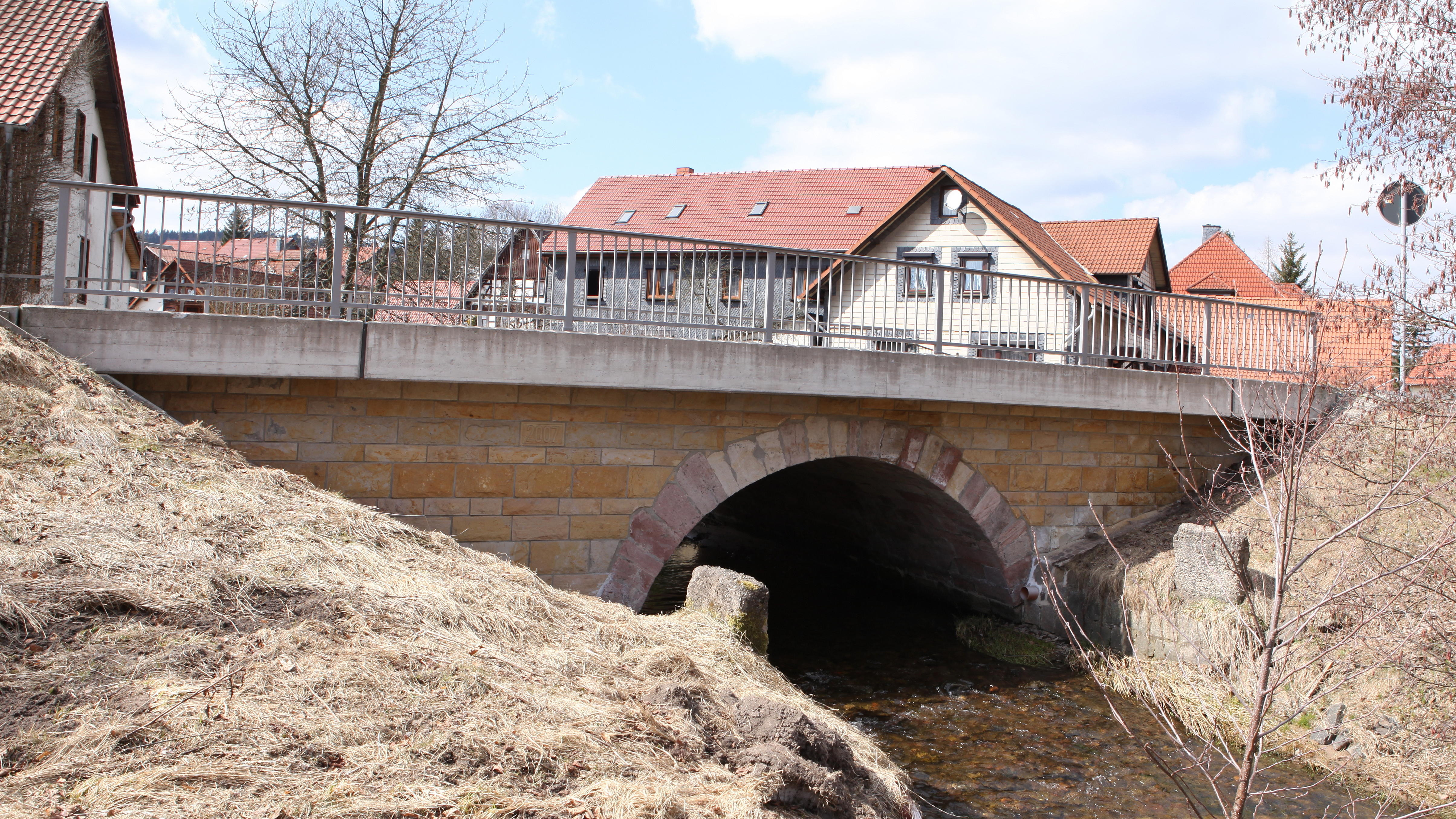 Brücke über die Erle in Erlau, Ot von St. Kilian, Landkreis Hildburghausen